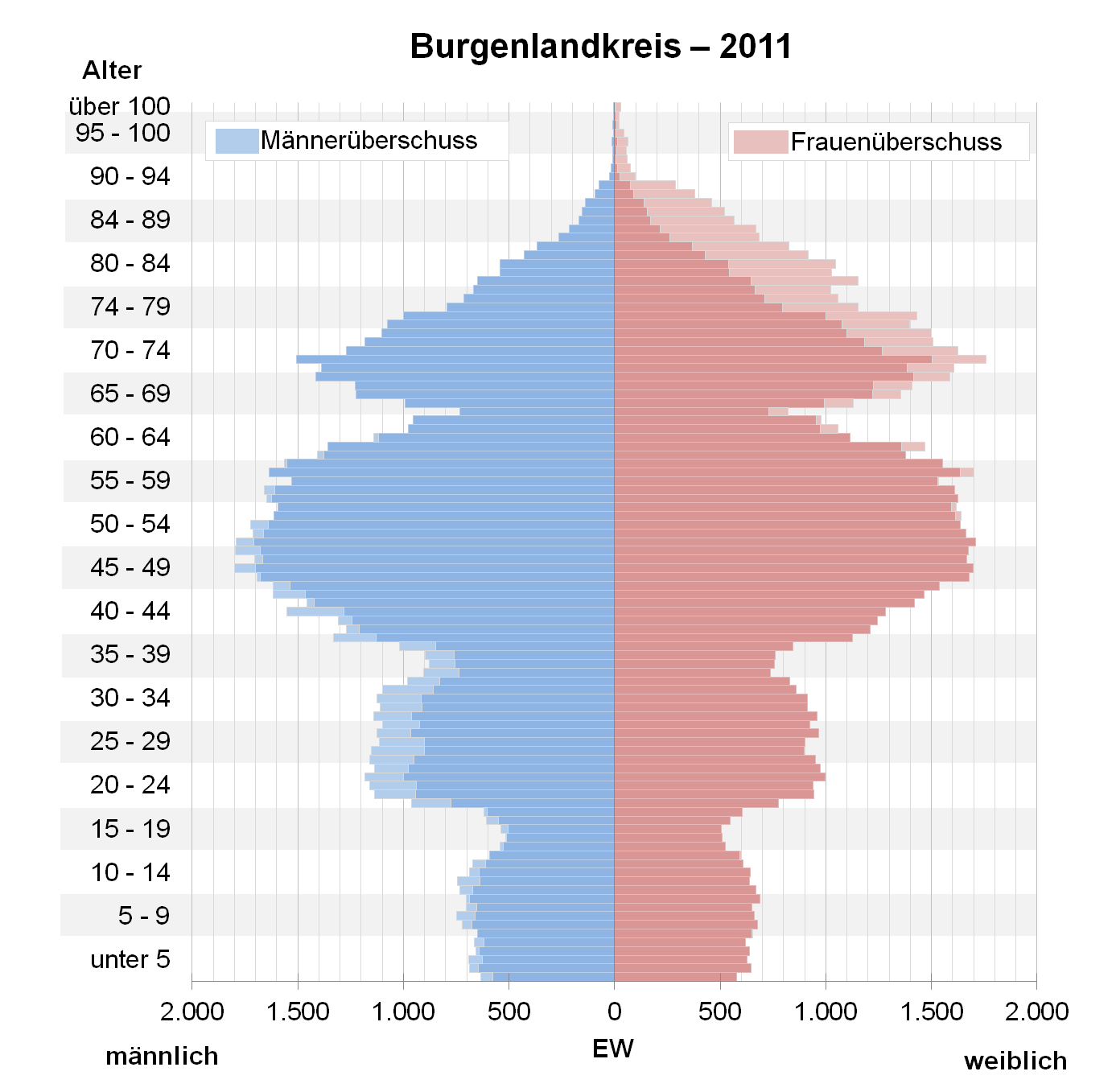 Bevölkerungspyramide des Burgenlandkreises nach Zensus 2011.